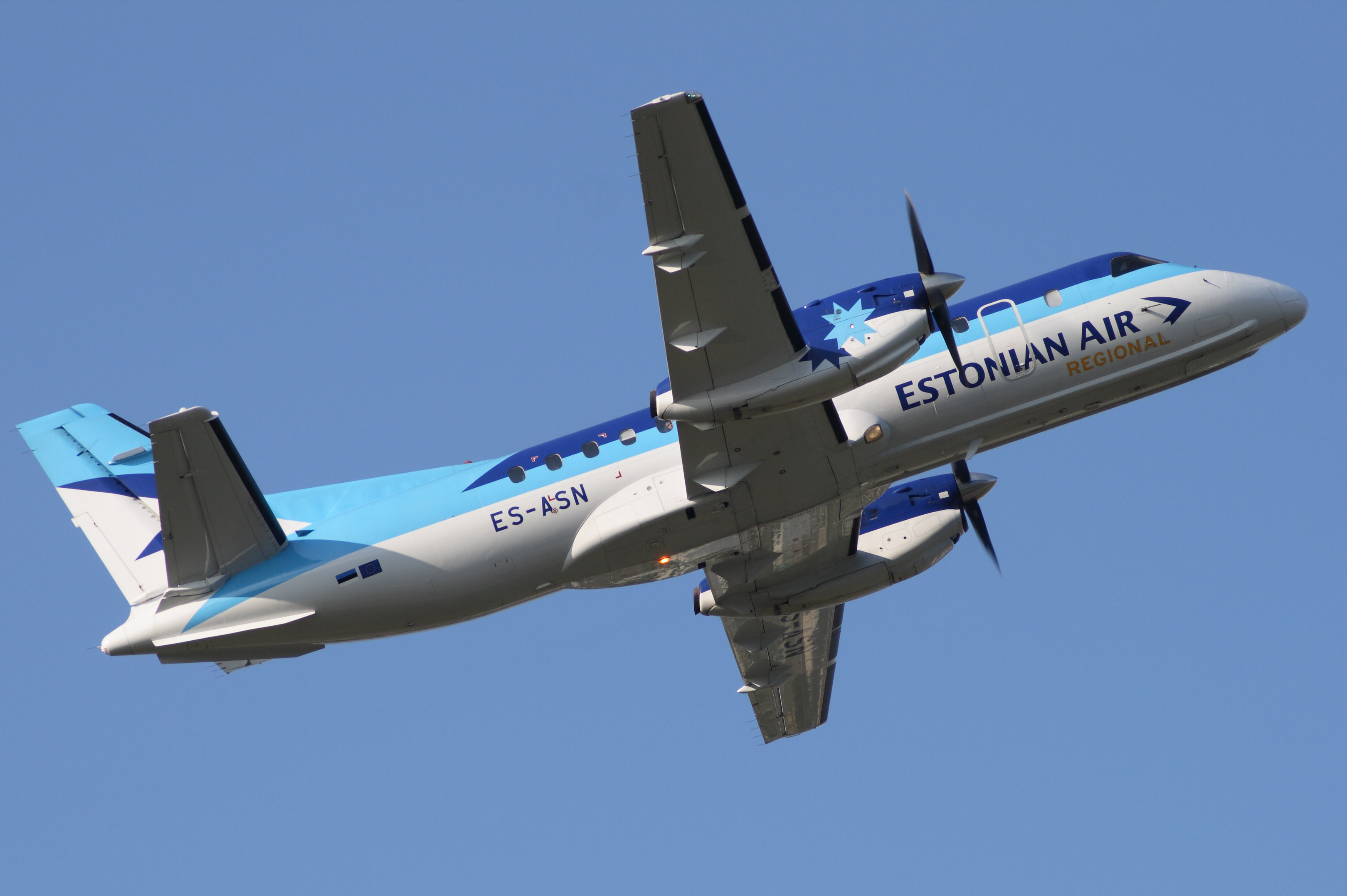 Estonian Airi Saab 340A (ES-ASN) õhkutõusul Tallinnast